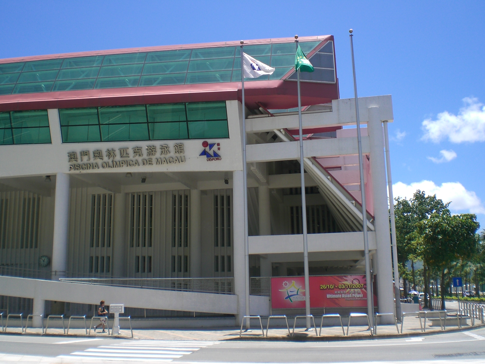 澳門奧林匹克游泳館是位於氹仔體育路148號.